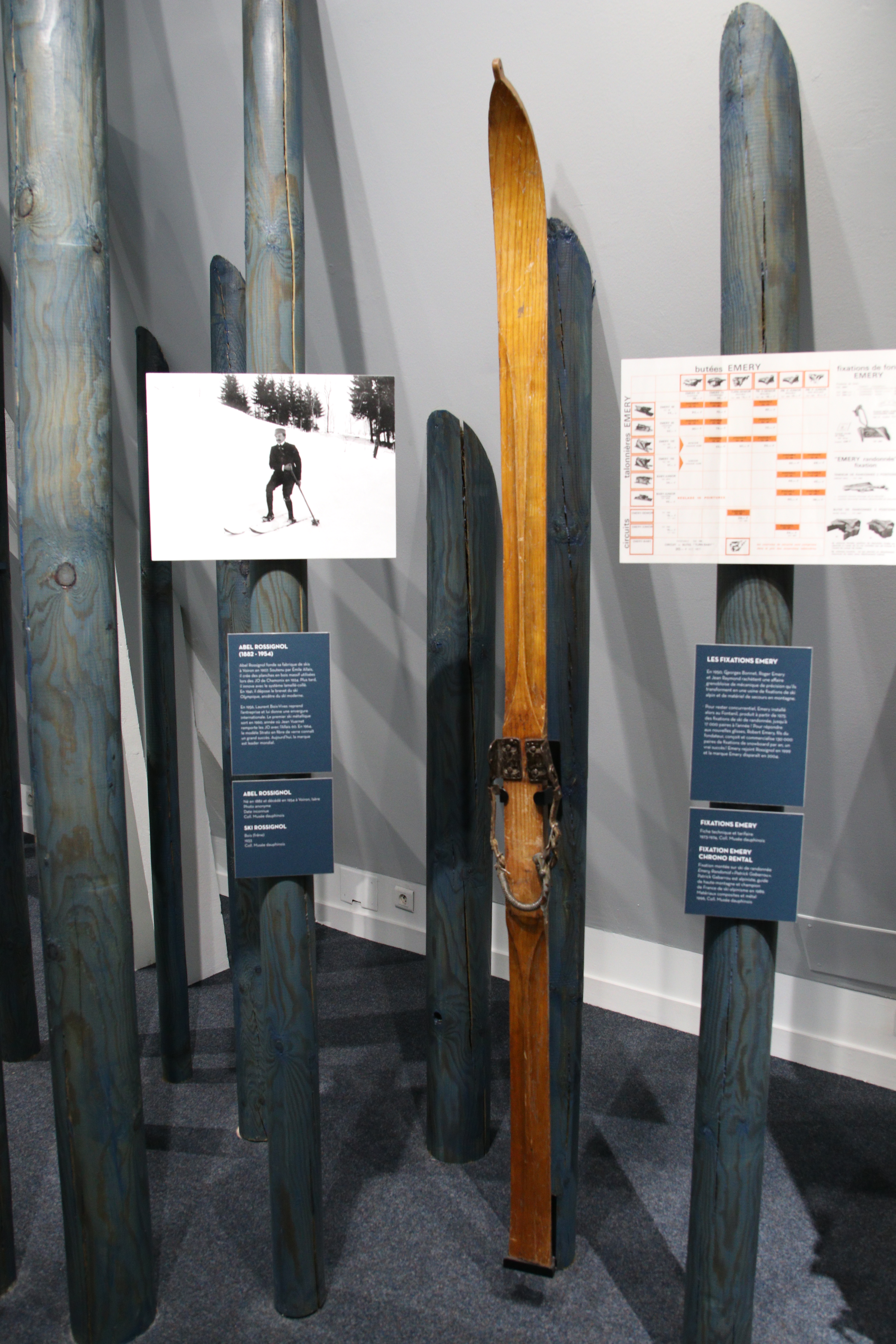 Ski marque Rossignol en bois de frêne, 1933, Collection Musée dauphinois. Exposition de longue durée "Le rêve blanc. L'épopée des sports d'hiver dans les Alpes" au Musée dauphinois, Grenoble